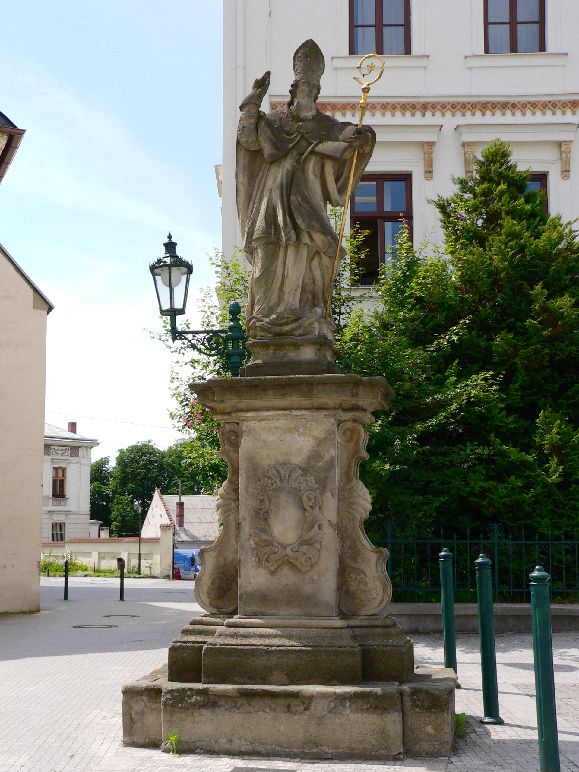 Socha sv.Patrika z druhé poloviny 18. století v Karviné-Fryštátě.